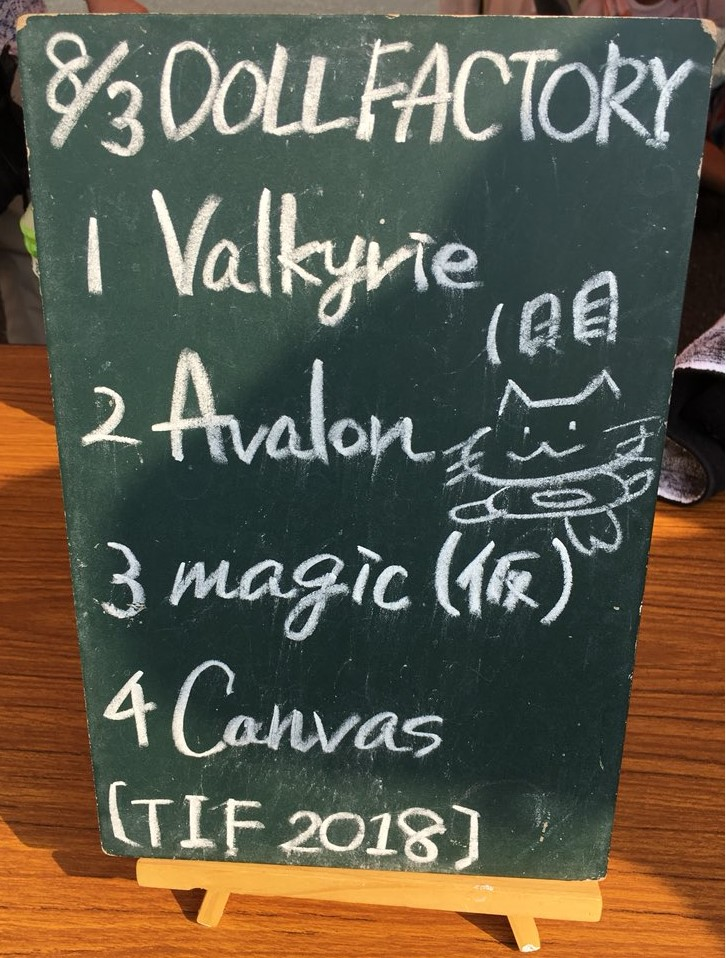 amiinAセトリボード(20180803(1))